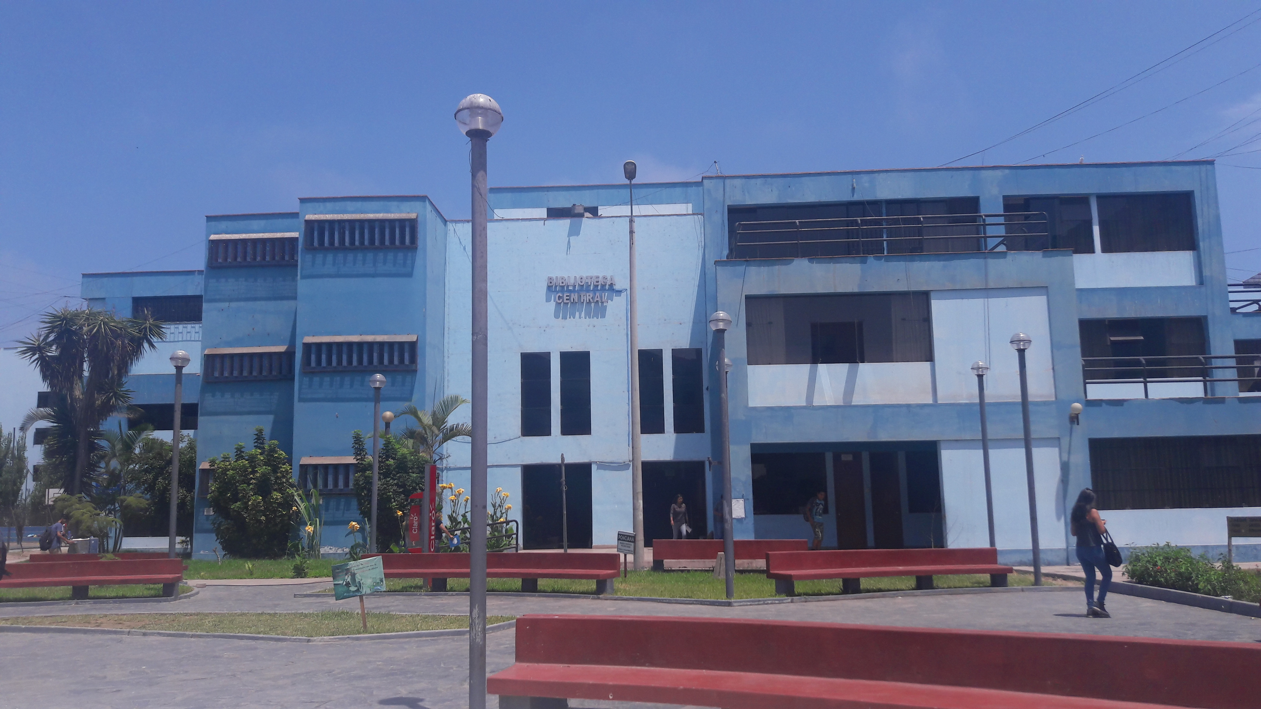 UNAC-Biblioteca Central